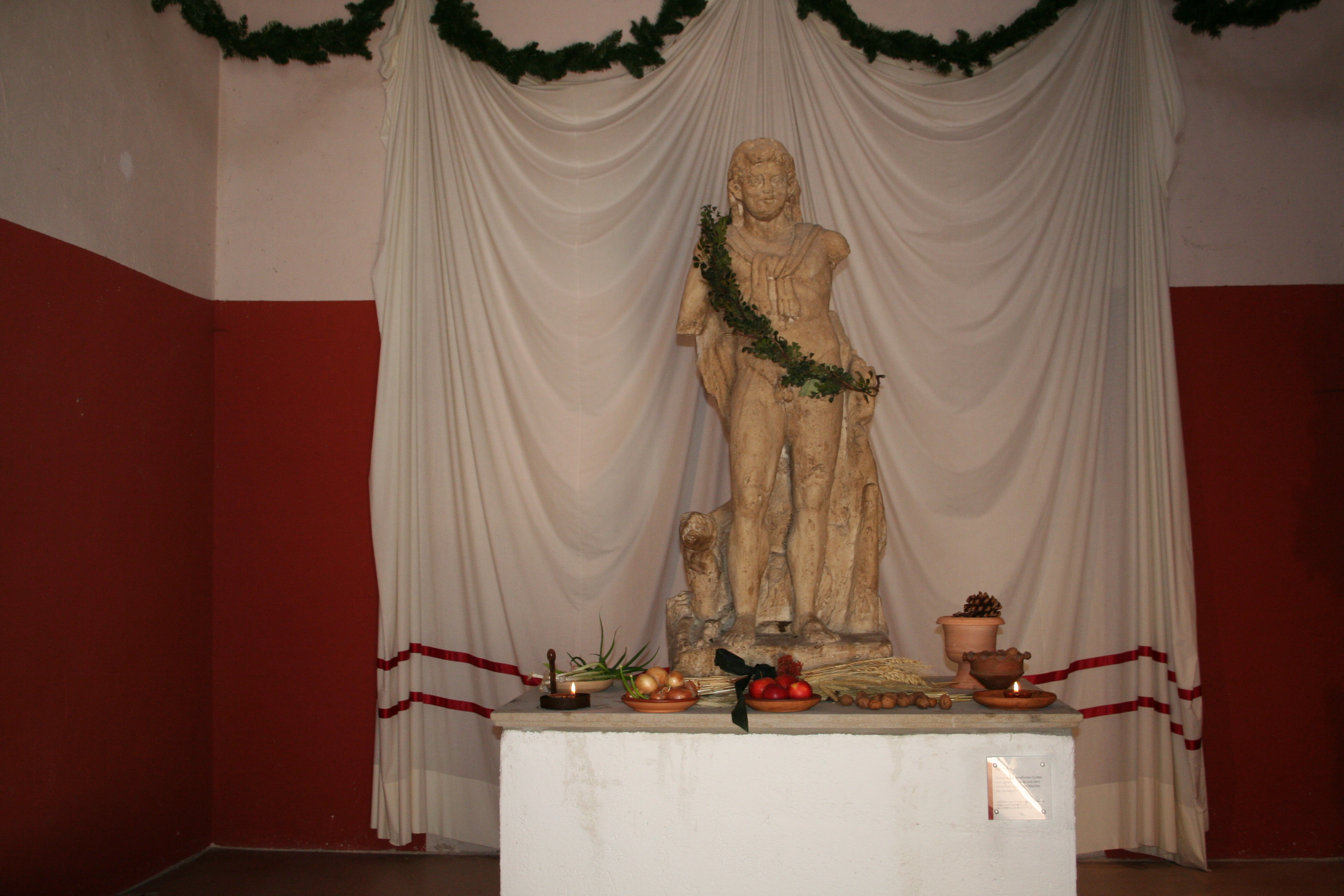 Archäologischer Park Cambodunum, Kempten